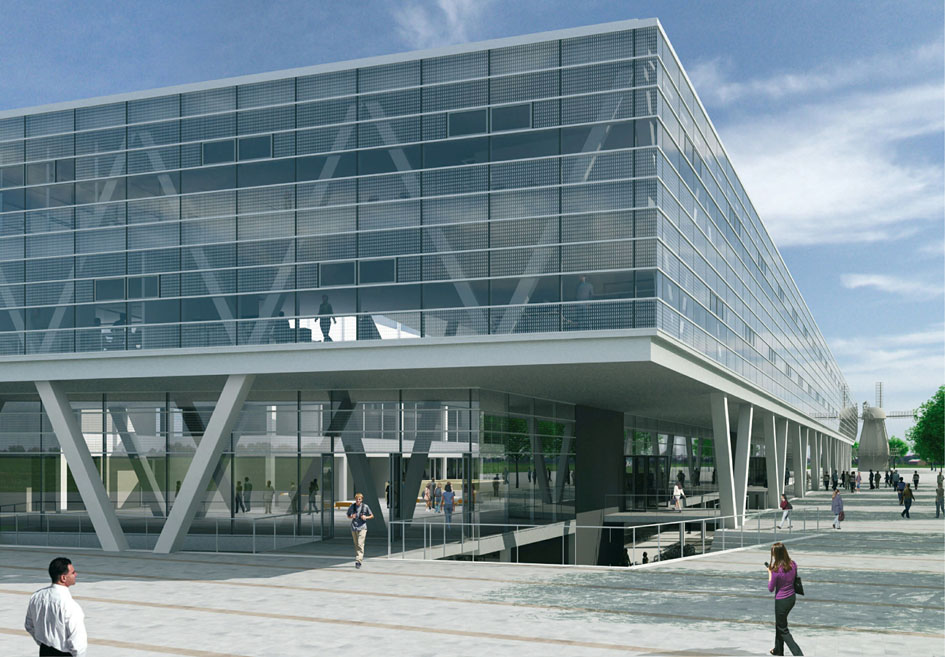 NHL Hogeschool